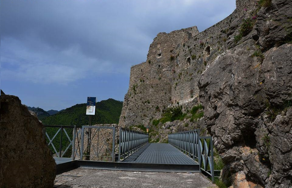 Il castello Arechi di Salerno